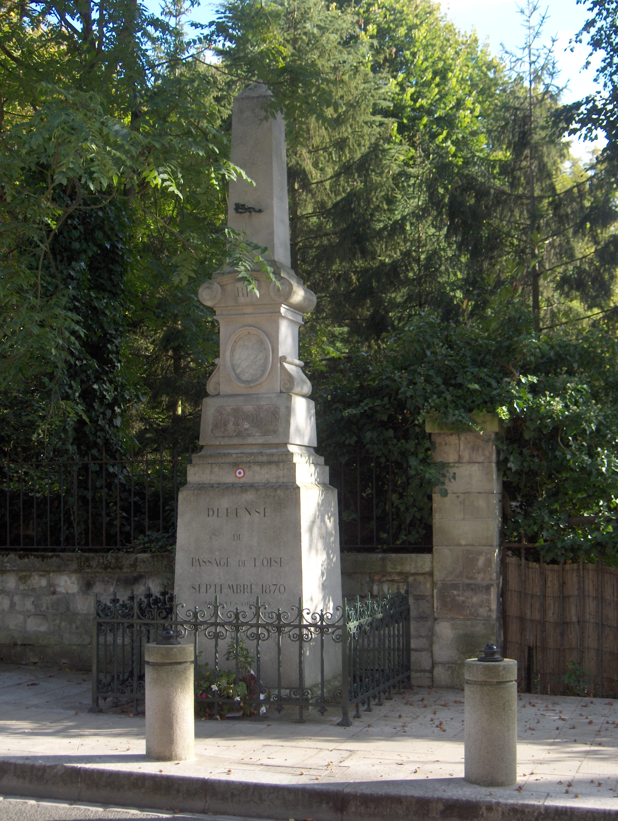 Monument à L'Isle-Adam commémorant la défense du passage de l'Oise en 1870